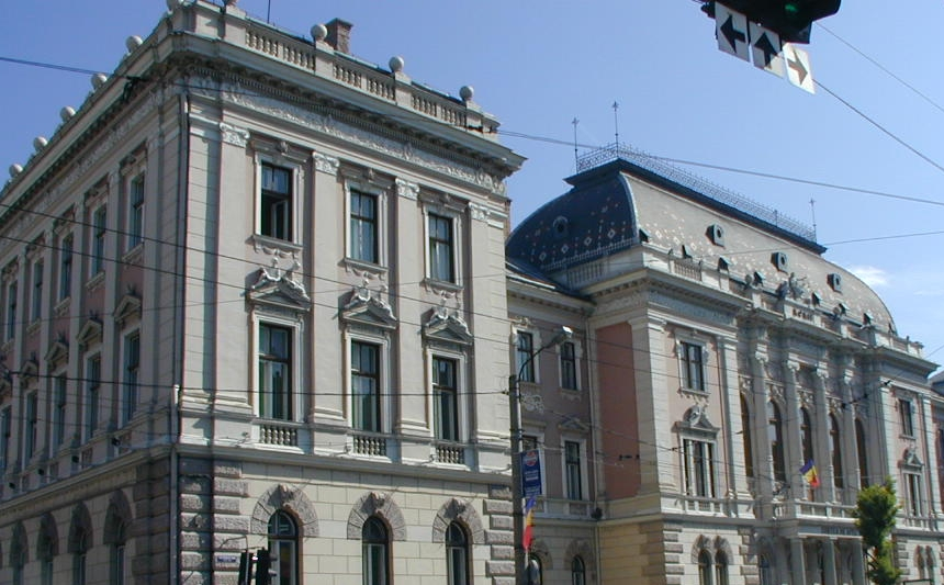 Palatul de Justiţie din Cluj-Napoca - Palace Justine in Cluj-Napoca